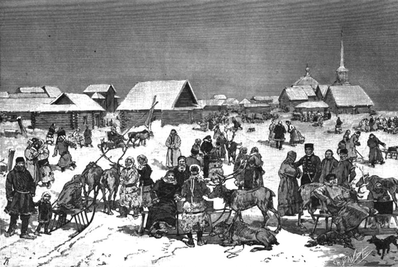 Ярмарка в Обдорске